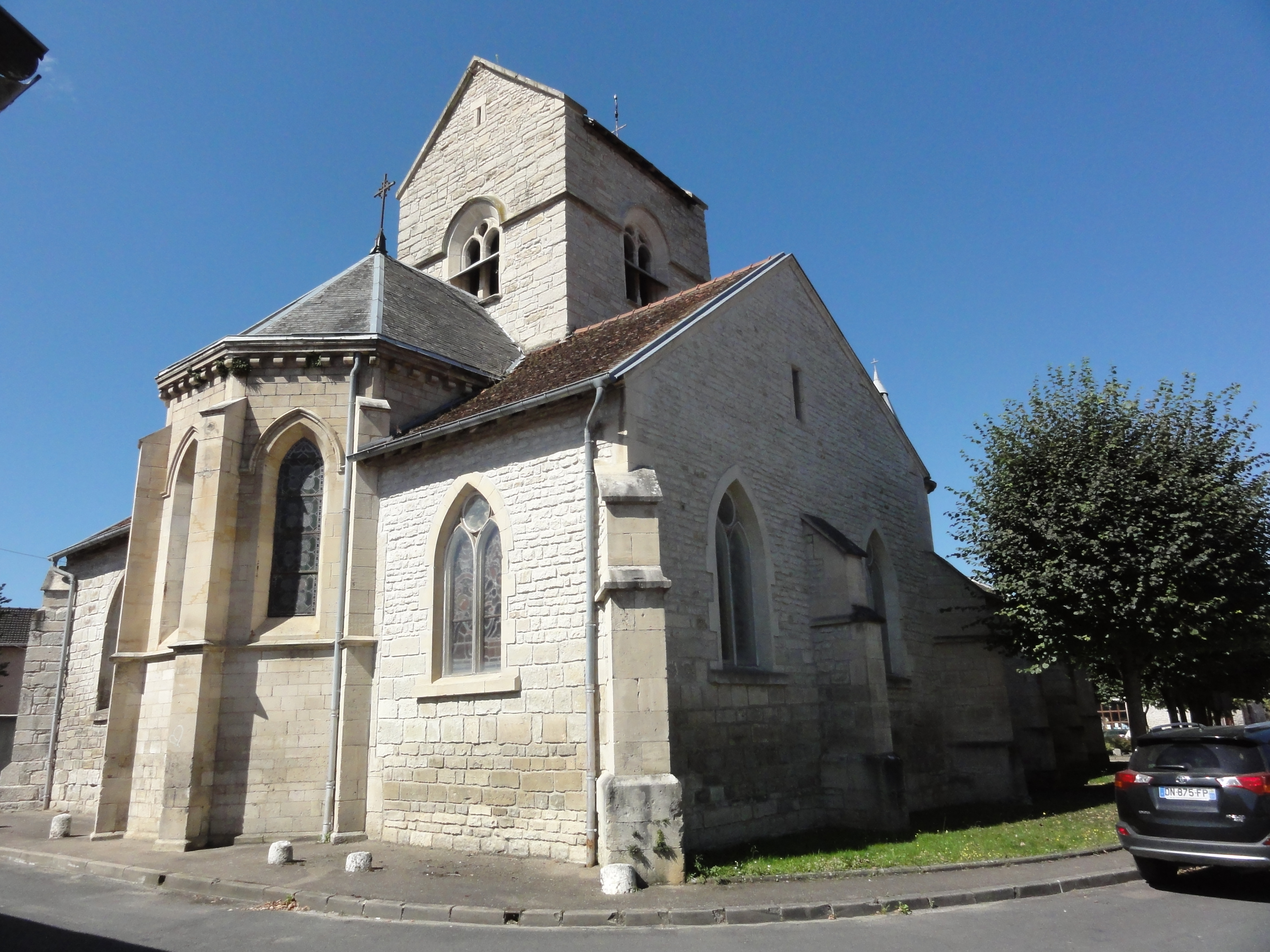 Chamouilley (Haute-Marne) église, nord-est